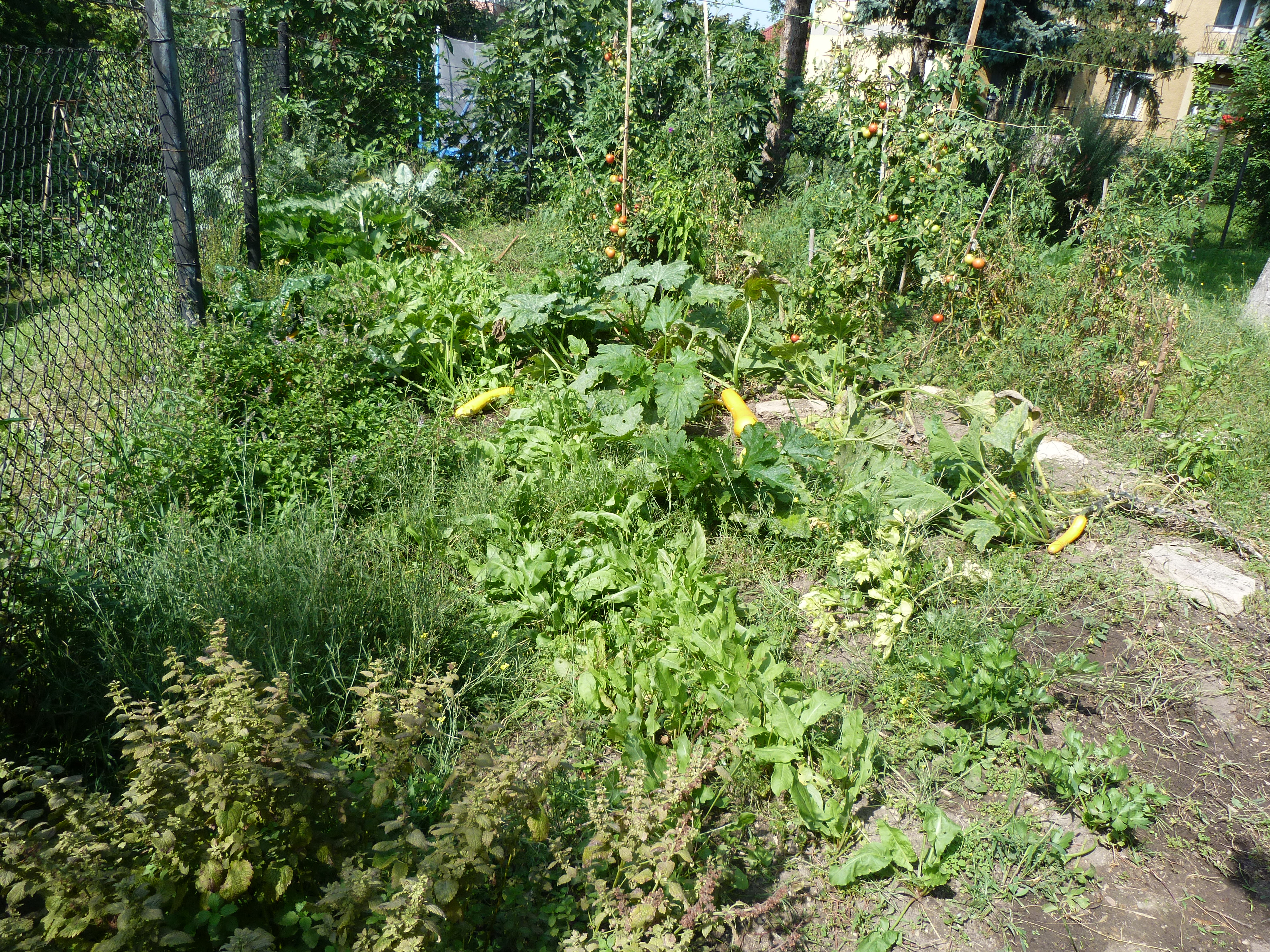 A felvétel 2014. szeptember 8-án készült Budapesten, Budán. A sashegyi természetvédelmi terület szomszédságában levő kert hátsó része konyhakert. A konyhakertben levő növények a fényképen közelről távolodva és balról jobbra a következők: citromfű, sóska, zeller, rukkola, cukkini, menta, kakukkfű, spenót, paradicsom, rebarbara, orvosi zsálya (1) paradicsom, tárkony, csicsóka (2) rebarbara, orvosi zsálya (3) kakukkfű, borsika (4). ©© Derzsi Elekes Andor, Budapest 2014, You are authorised to use these photos and vids under Creative Commons – even for commercial, for profit purposes. Photos must be attributed to Derzsi Elekes Andor. All of the photos and vids in the Metapolisz DVD line are under Creative Commons and can be used even for commercial – for profit – purposes. Recommended Citation Derzsi Elekes Andor: Metapolisz DVD line